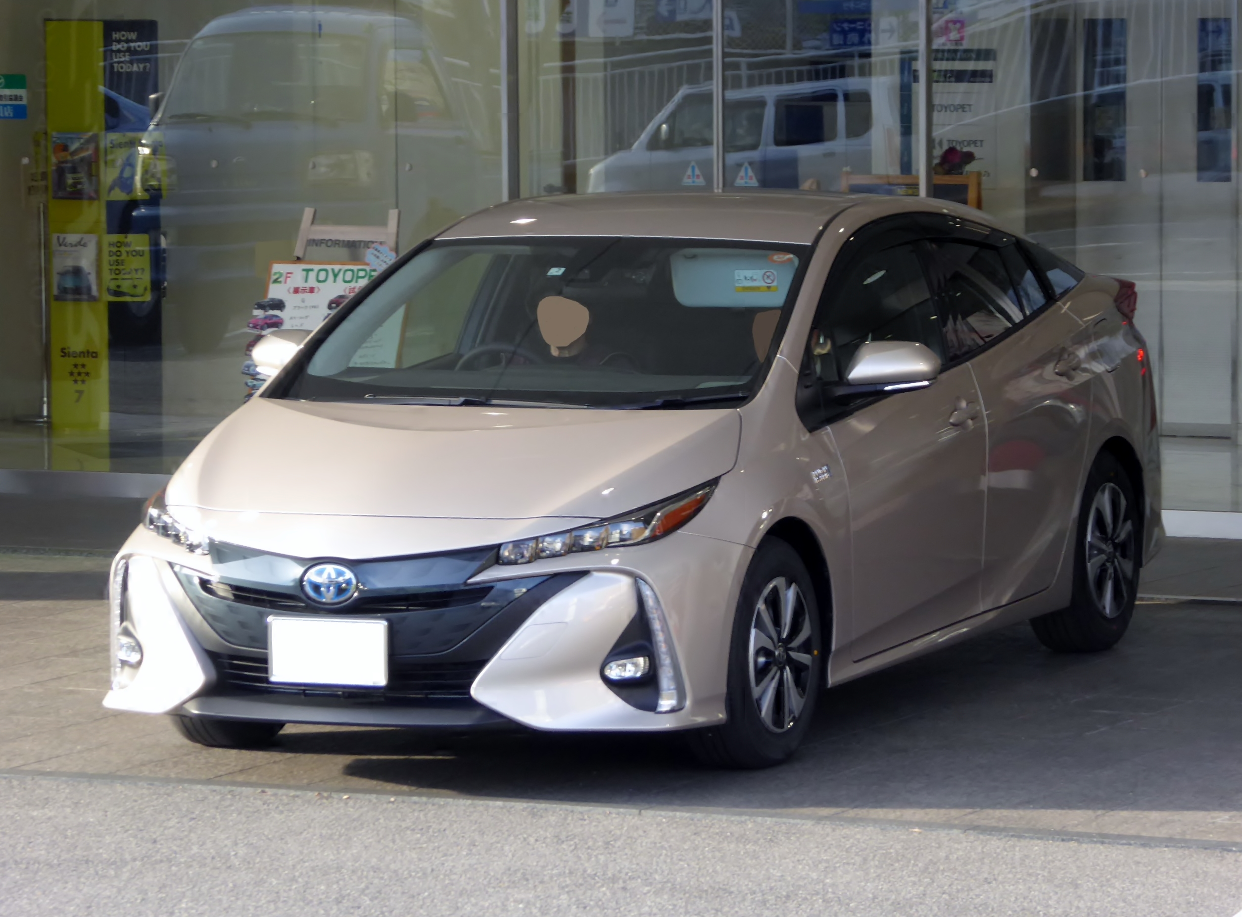 DLA-ZVW52-AHXHB型トヨタ・プリウスPHV Aをフロントから撮影。